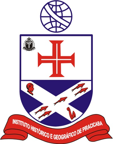 Brasão de Armas do Instituto Histórico e Geográfico de Piracicaba